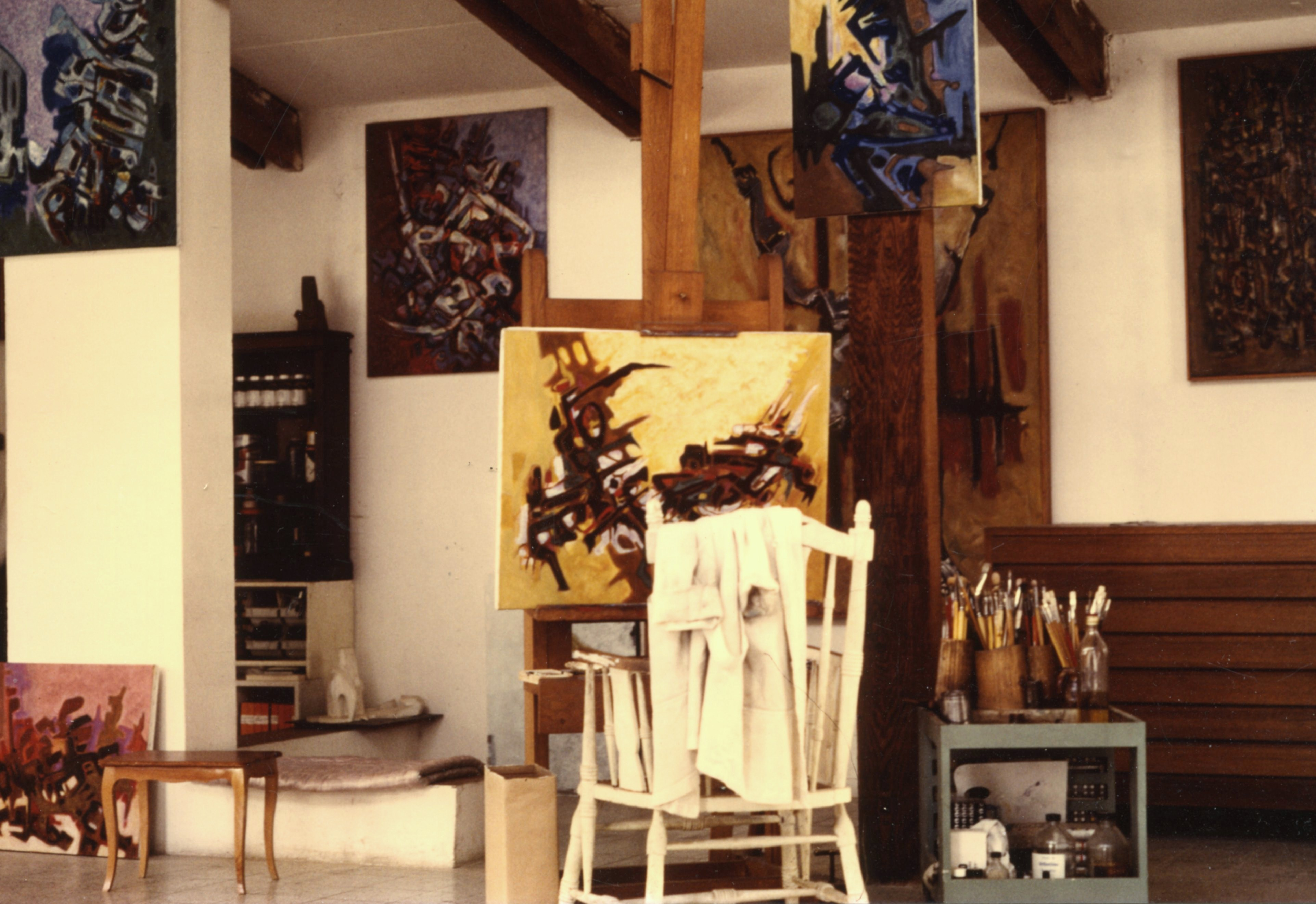 Atelier du peintre algérien Mohammed Khadda, Alger, 1986